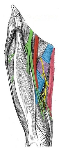 En amarillo el nervio obturador (rama anterior), en verde el nervio crural, en rojo la arteria femoral, en rosa el músculo grácil, en morado el aductor corto, en azul el aductor largo seccionado.